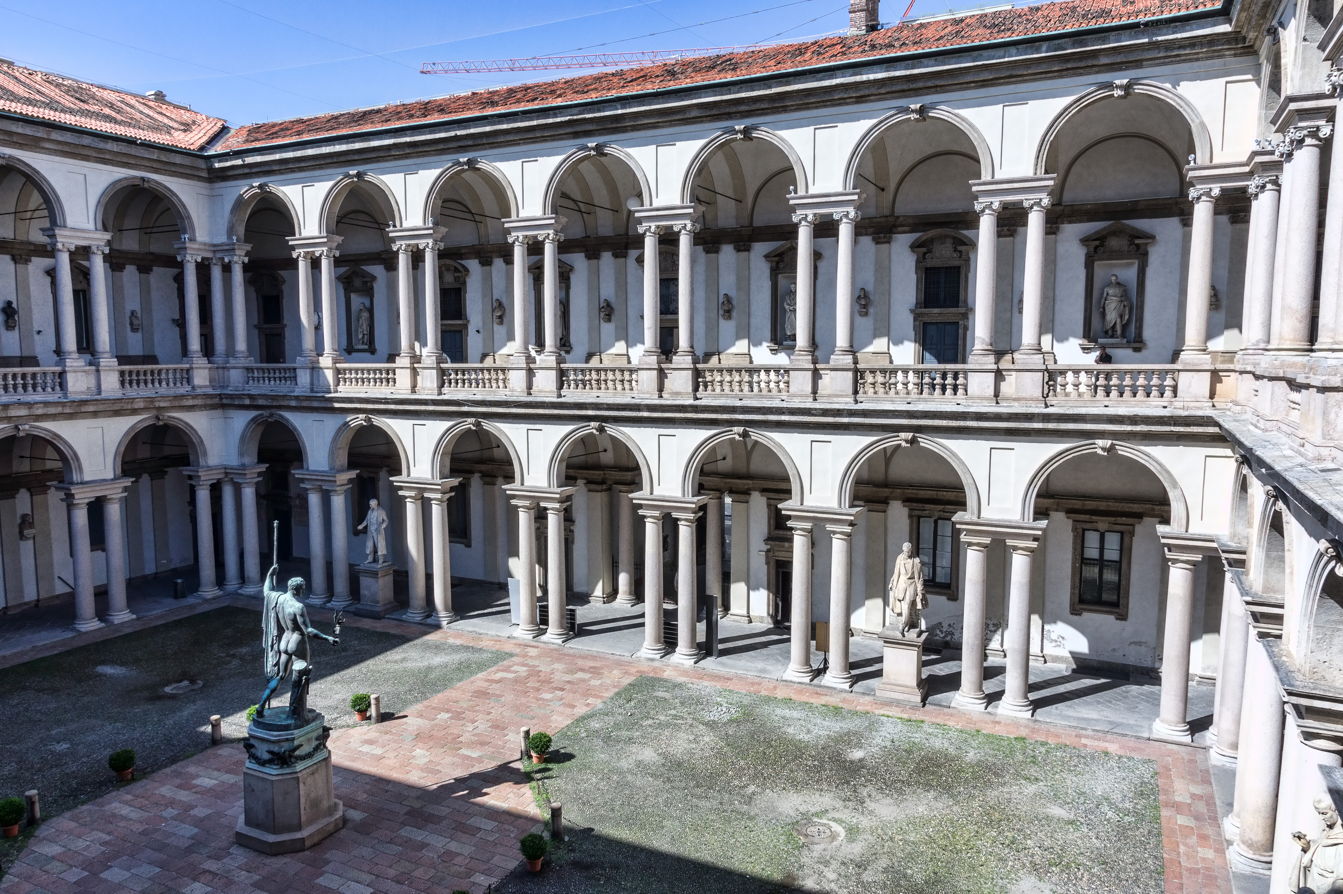 Milan - Pinacothèque de Brera - Cour intérieure